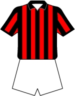 DescriÃ§Ã£o IlustraÃ§Ã£o do uniforme do Sport Club Mangueira, cidade do Rio de Janeiro. LicenÃ§a